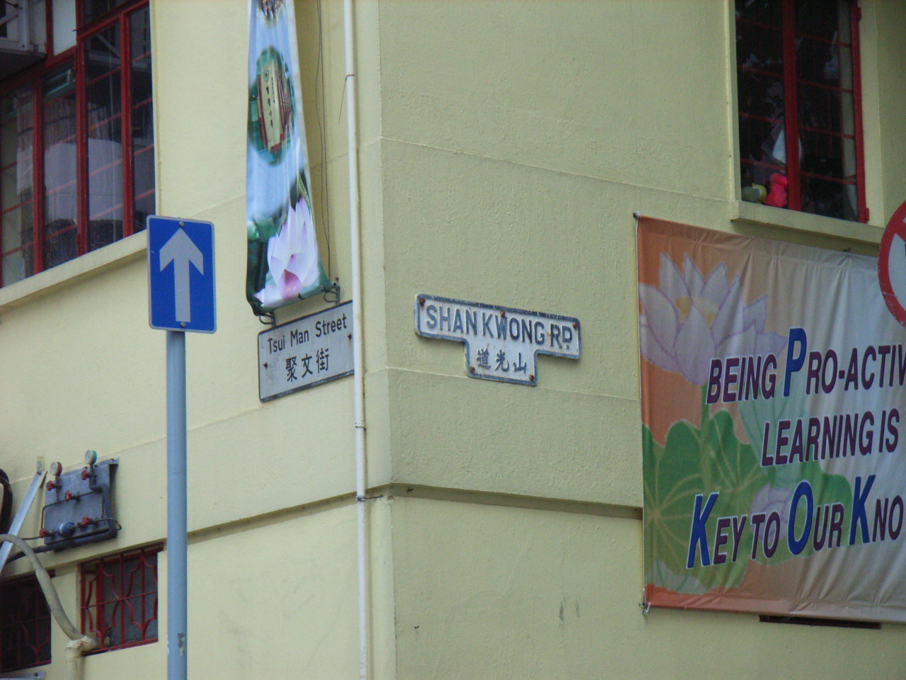 山光道(Shan Kwong Road)，是香港島zh:跑馬地市中心內第三條最長的街道 Author: BEVERLYSHEN